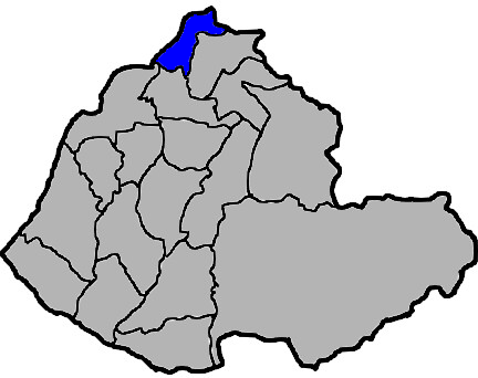 中華民國苗栗縣竹南鎮，KJ (talk)繪製。